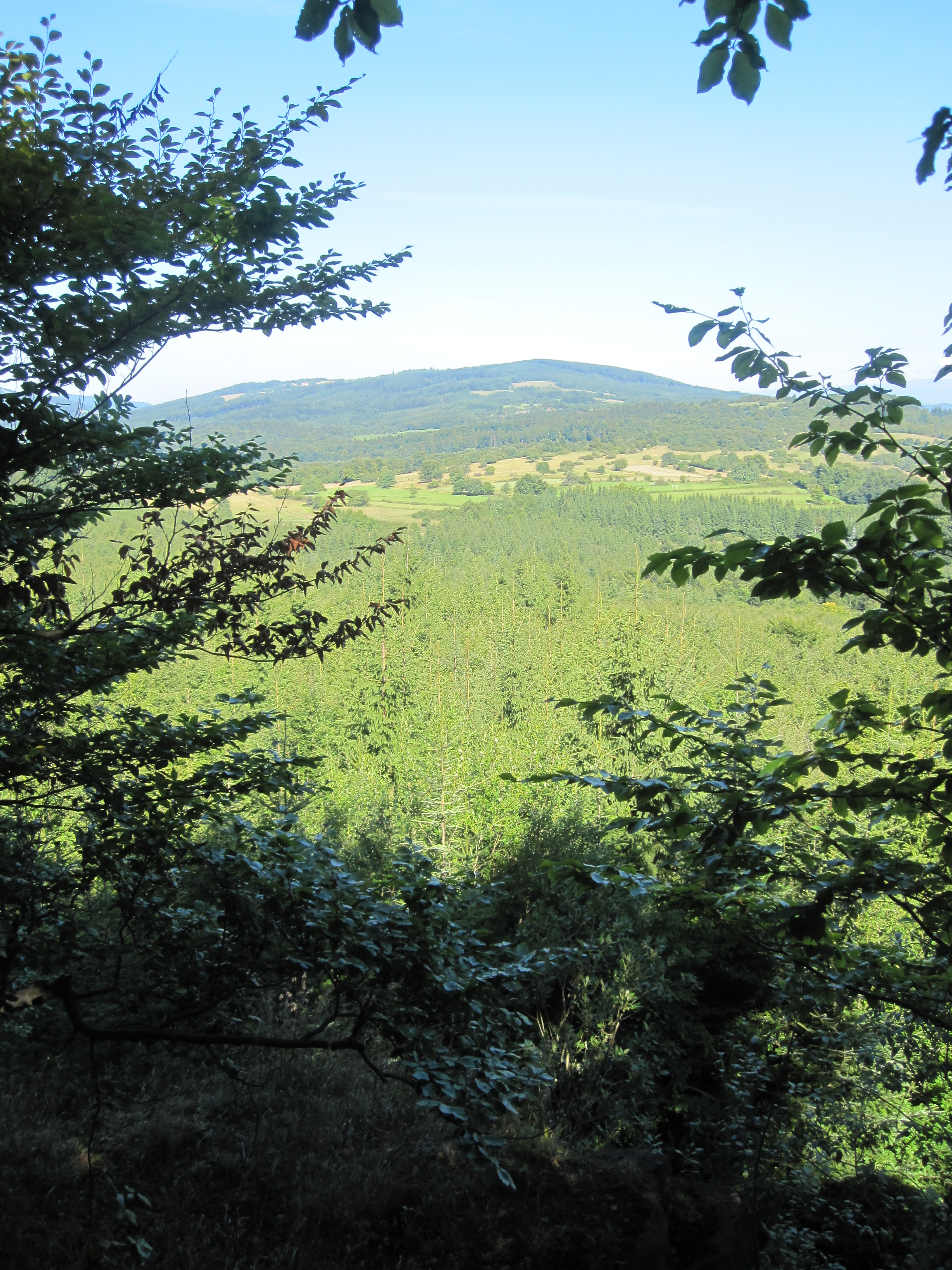 Budinská skala: pohľad na Ostrôžky